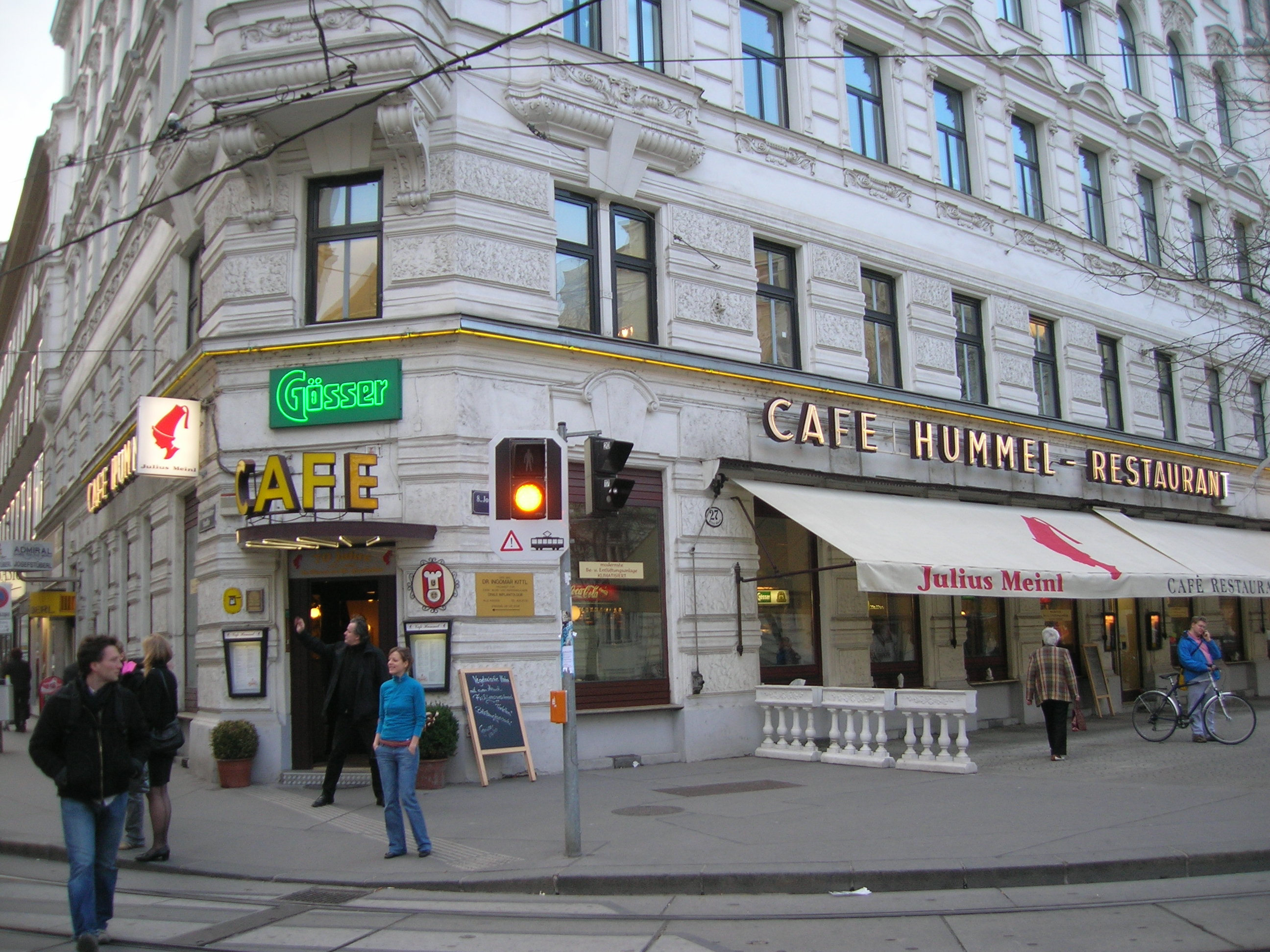 Café Hummel in Vienna